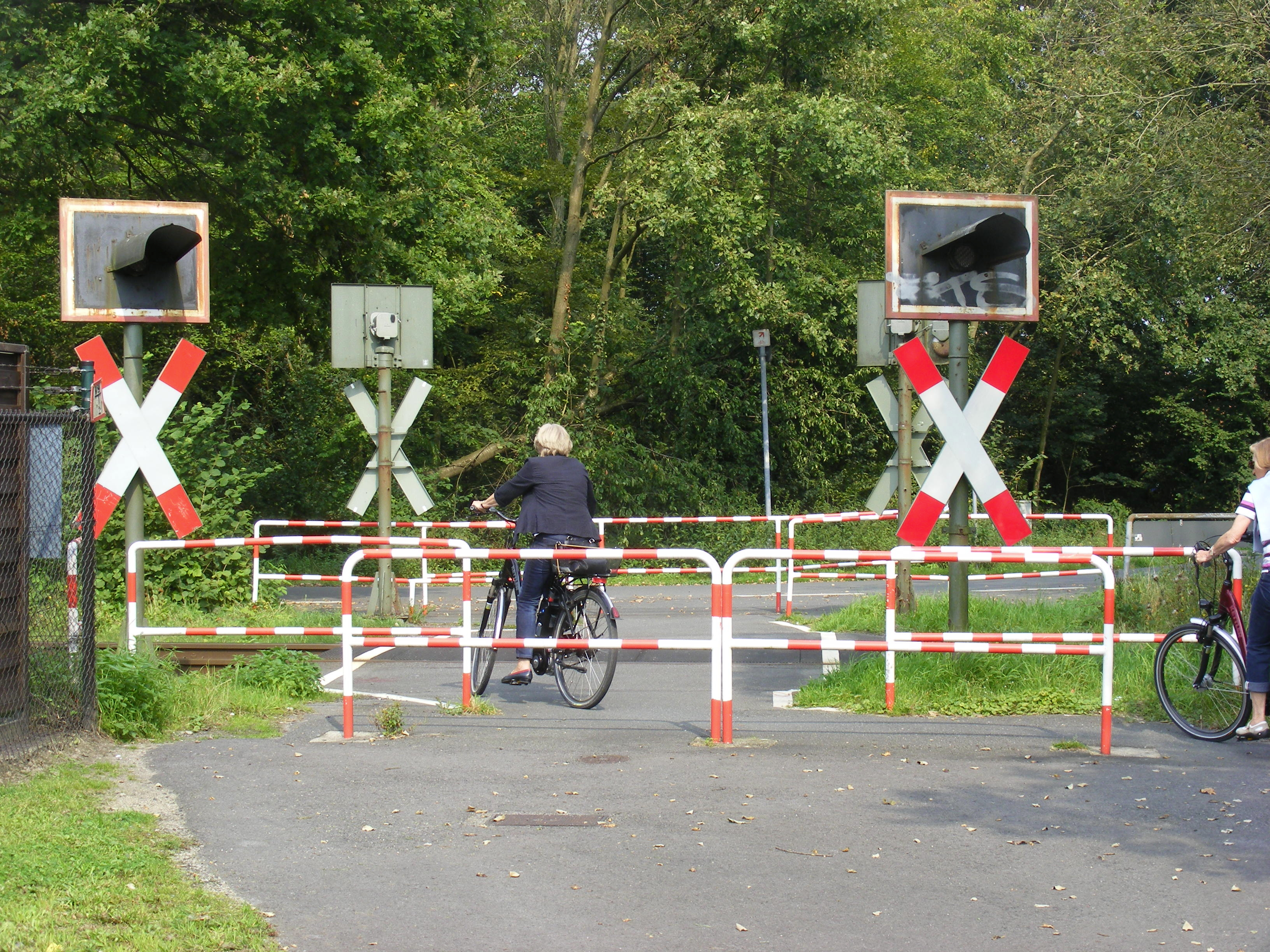 Münster-Mecklenbeck: Wer sich durch die Umlaufsperre müht, sieht nicht, wenn das rote Warnlicht aufleuchtet, weil ein Zug naht